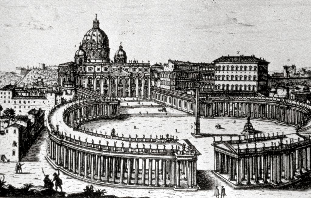 Piazza San Pietro a Roma secondo il progetto di Bernini